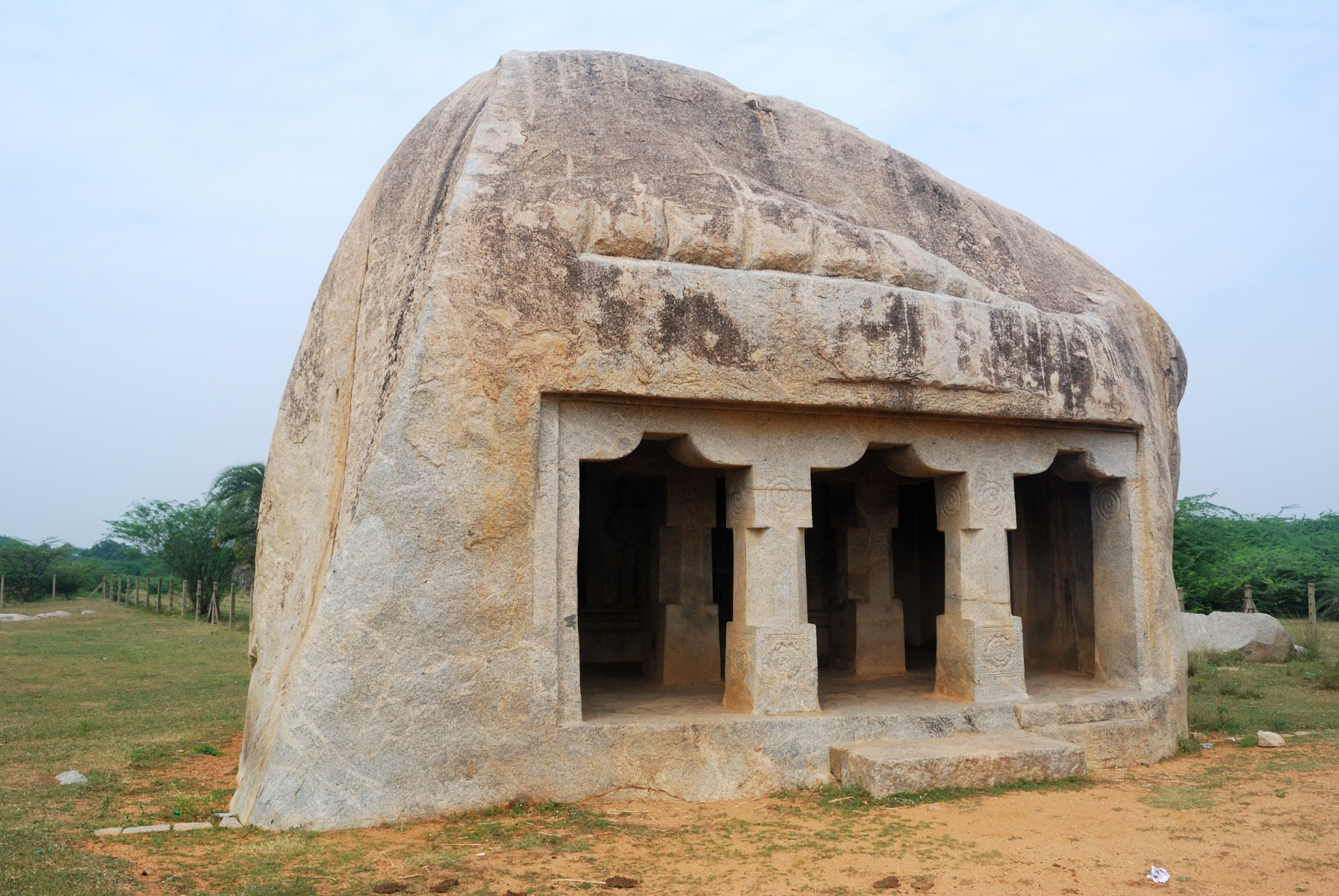 Der in einen Findling gehauene Mahendravadi-Tempel aus dem 7. Jahrhundert. Er liegt nördlich von Kanchipuram im indischen Bundesstaat Tamil Nadu.